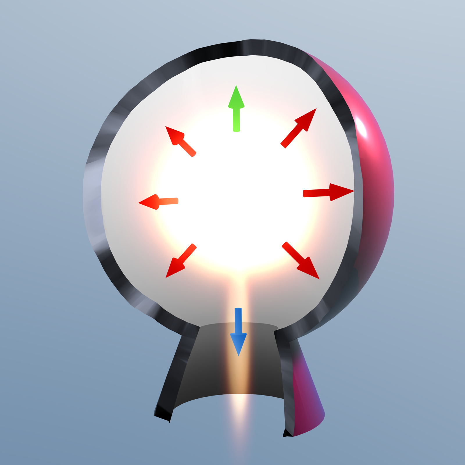 Wirkungsweise des Rückstoßantriebs